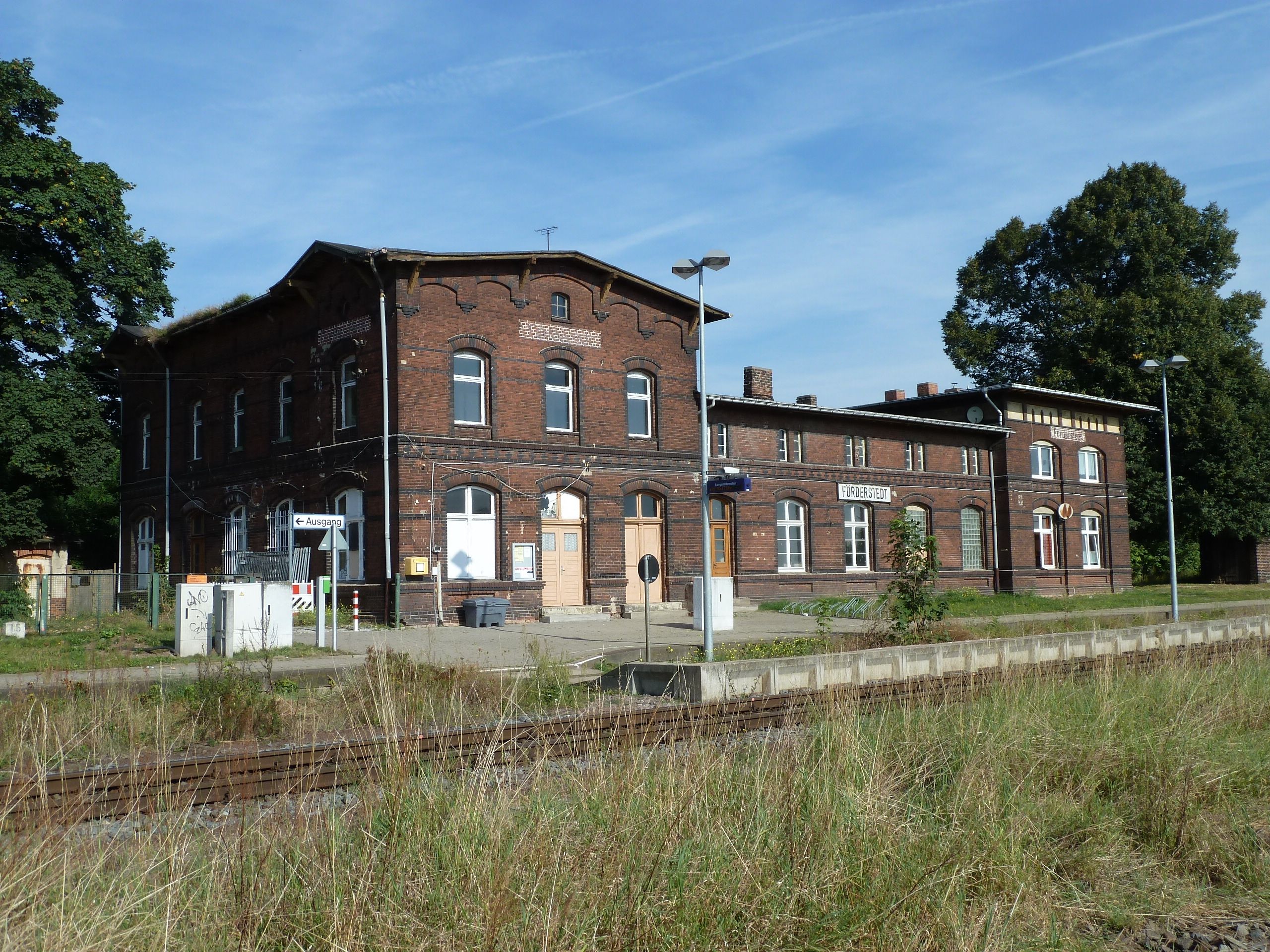 Bahnhof Förderstedt, denkmalgeschütztes ehemaliges Empfangsgebäude, Gleisseite